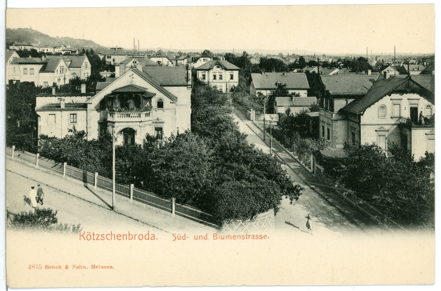 Kötzschenbroda; Süd - und Blumenstraße This postcard is from publisher Brück & Sohn in Meißen ( postcard has a unique number 04845 and is available in a higher resolution at the publisher. This images was uploaded in a cooperation project between Wikipedians and the publisher.